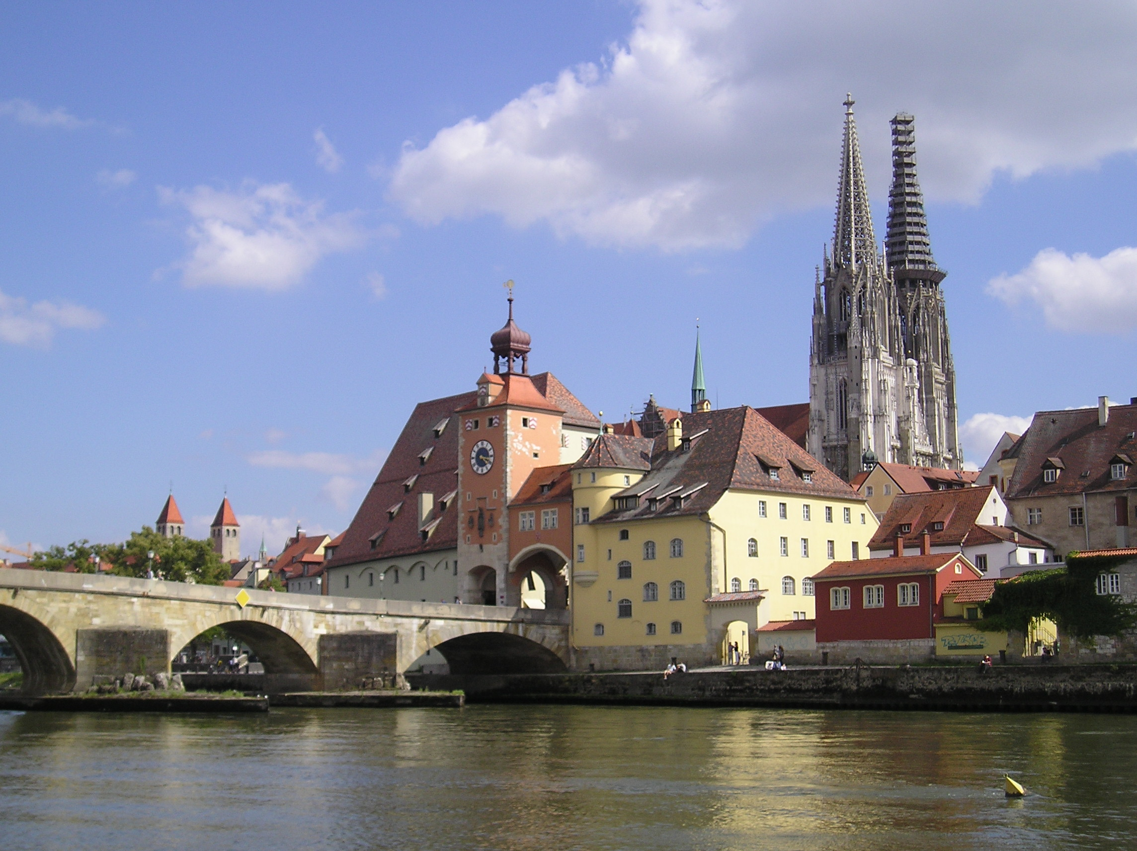 Stadtansicht von Regensburg mit Dom und Steinerner Brücke